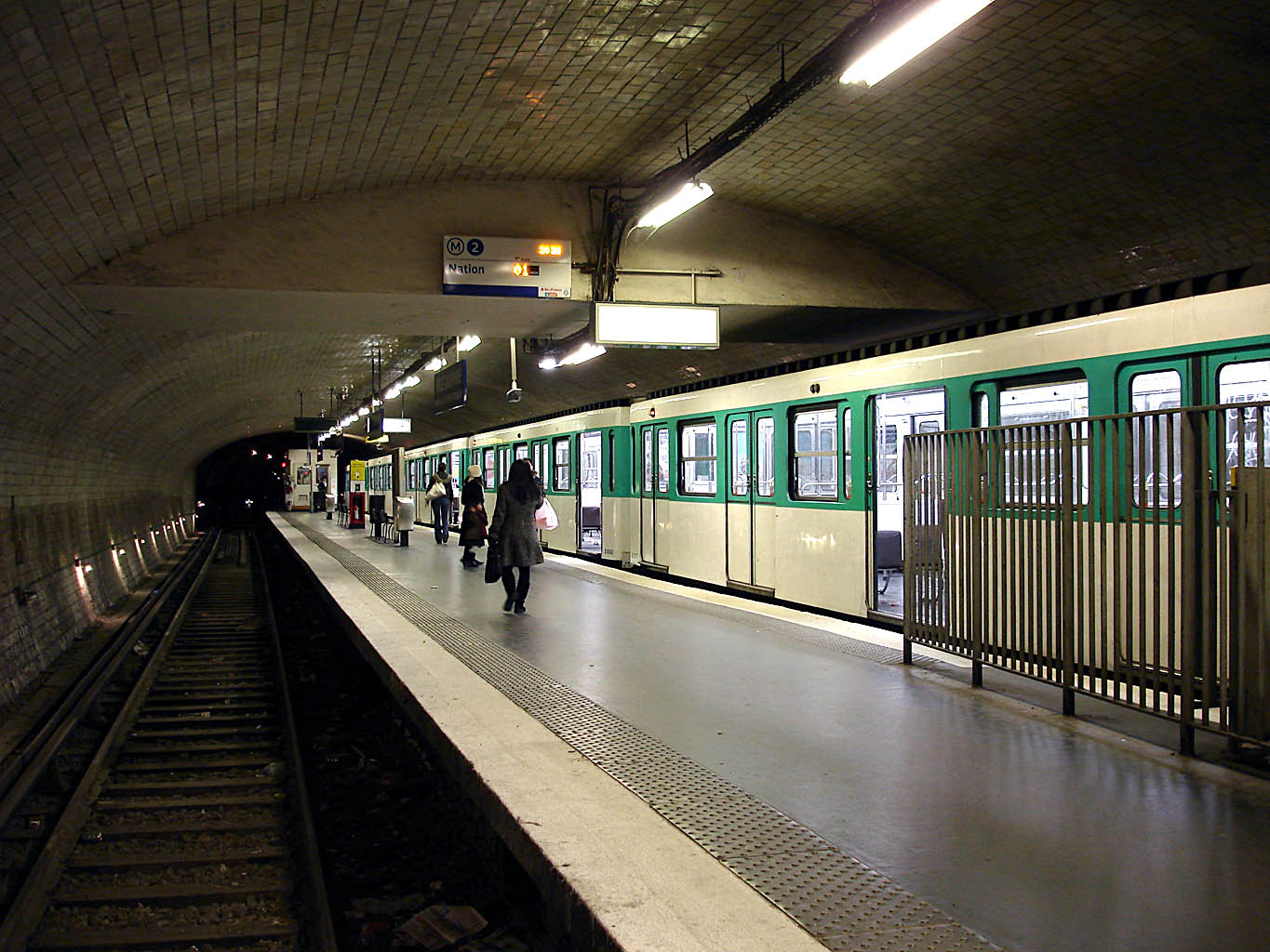 Station Porte Dauphine de la ligne 2 du métro de Paris, France.